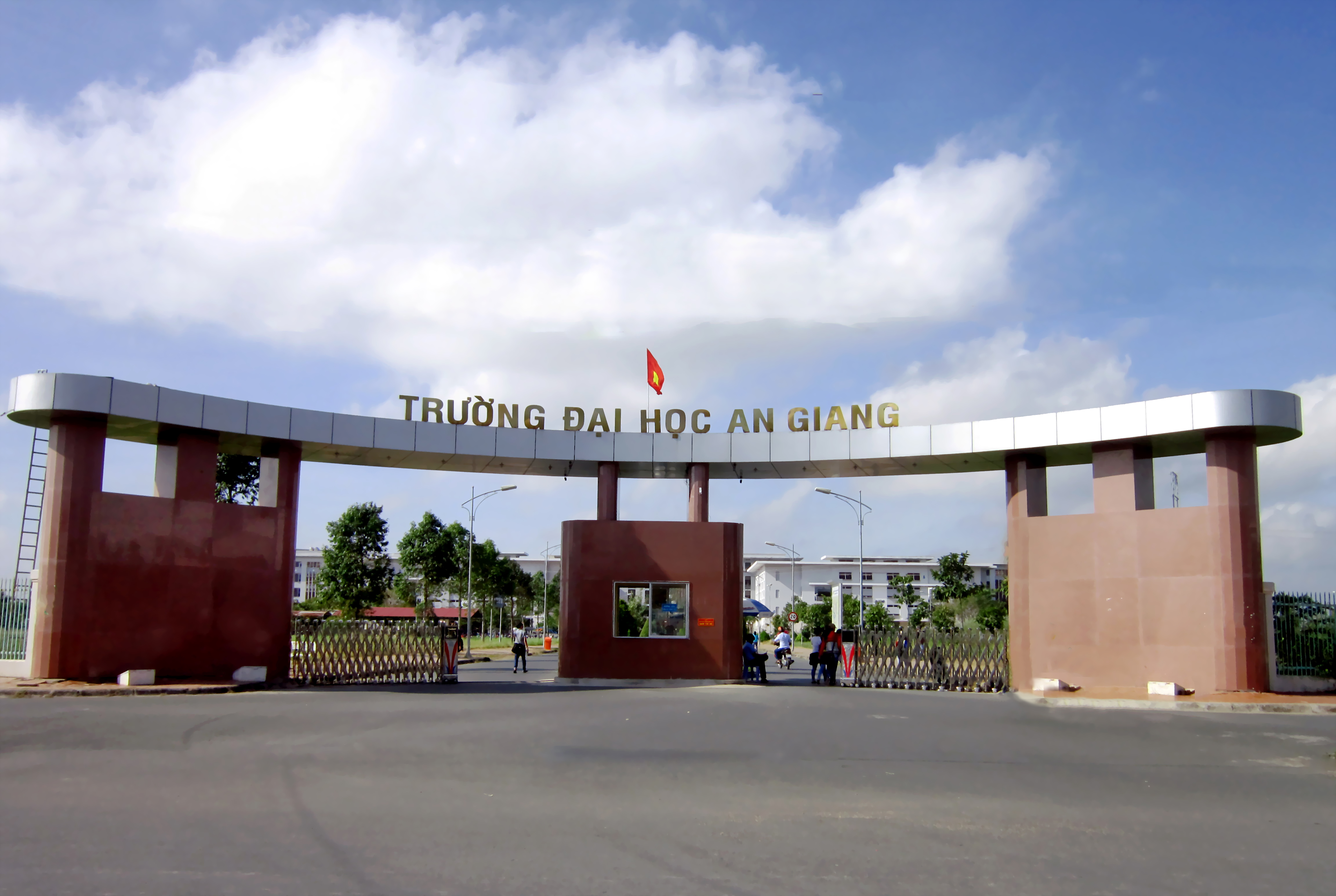 Đại học An Giang ở TP. Long Xuyên, An Giang, Việt Nam.